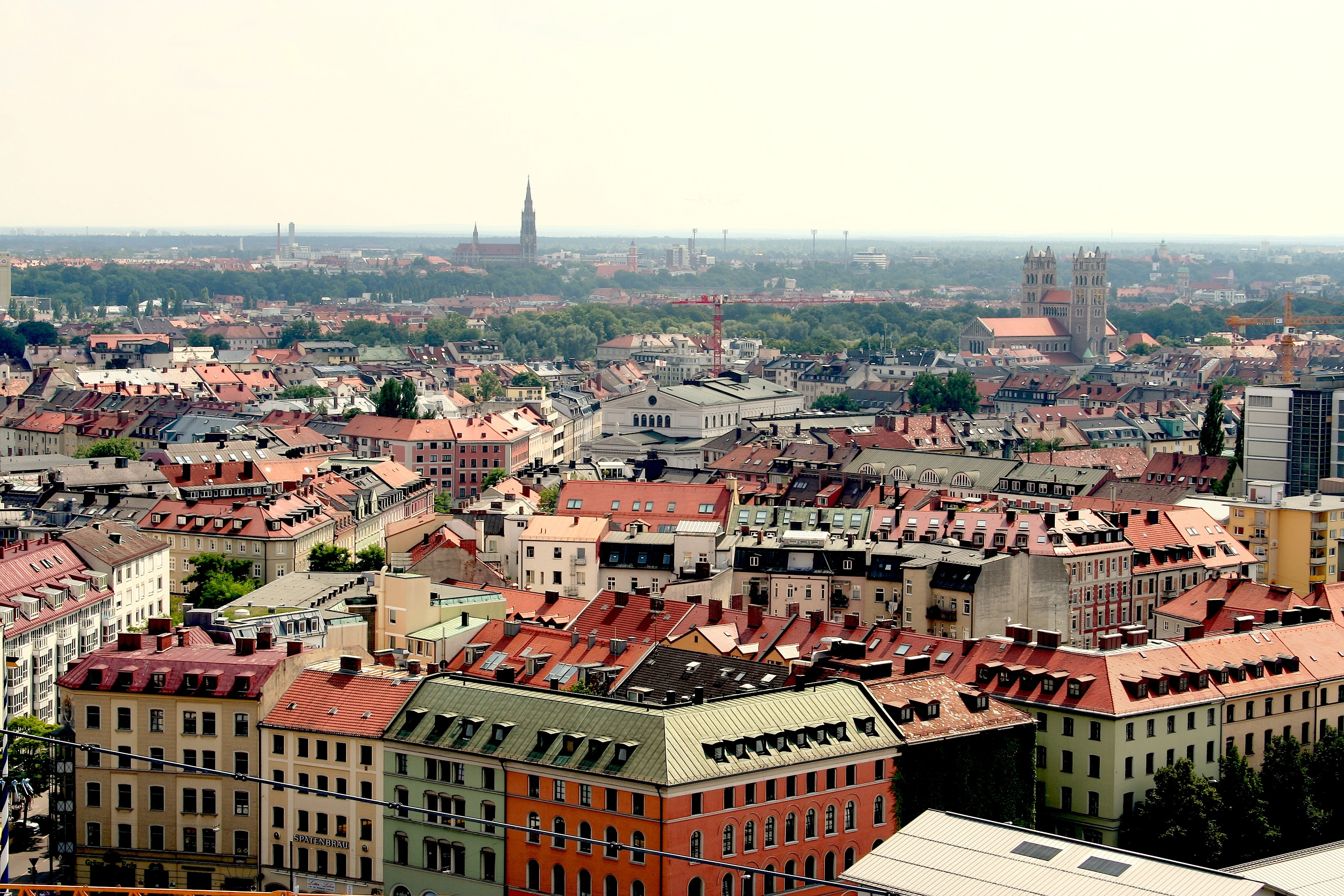 Gärtnerplatzviertel vom Alten Peter